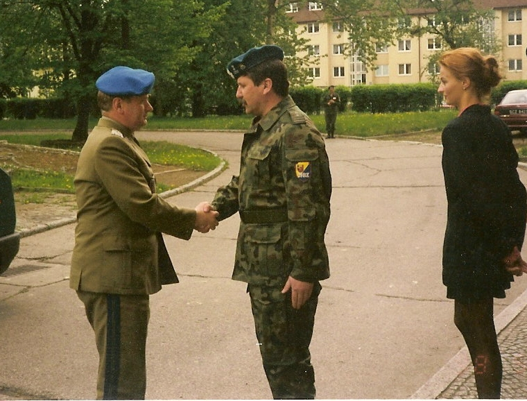 29 Brygada Zmechanizowana w Szczecinie - wizyta gen. Głowienki